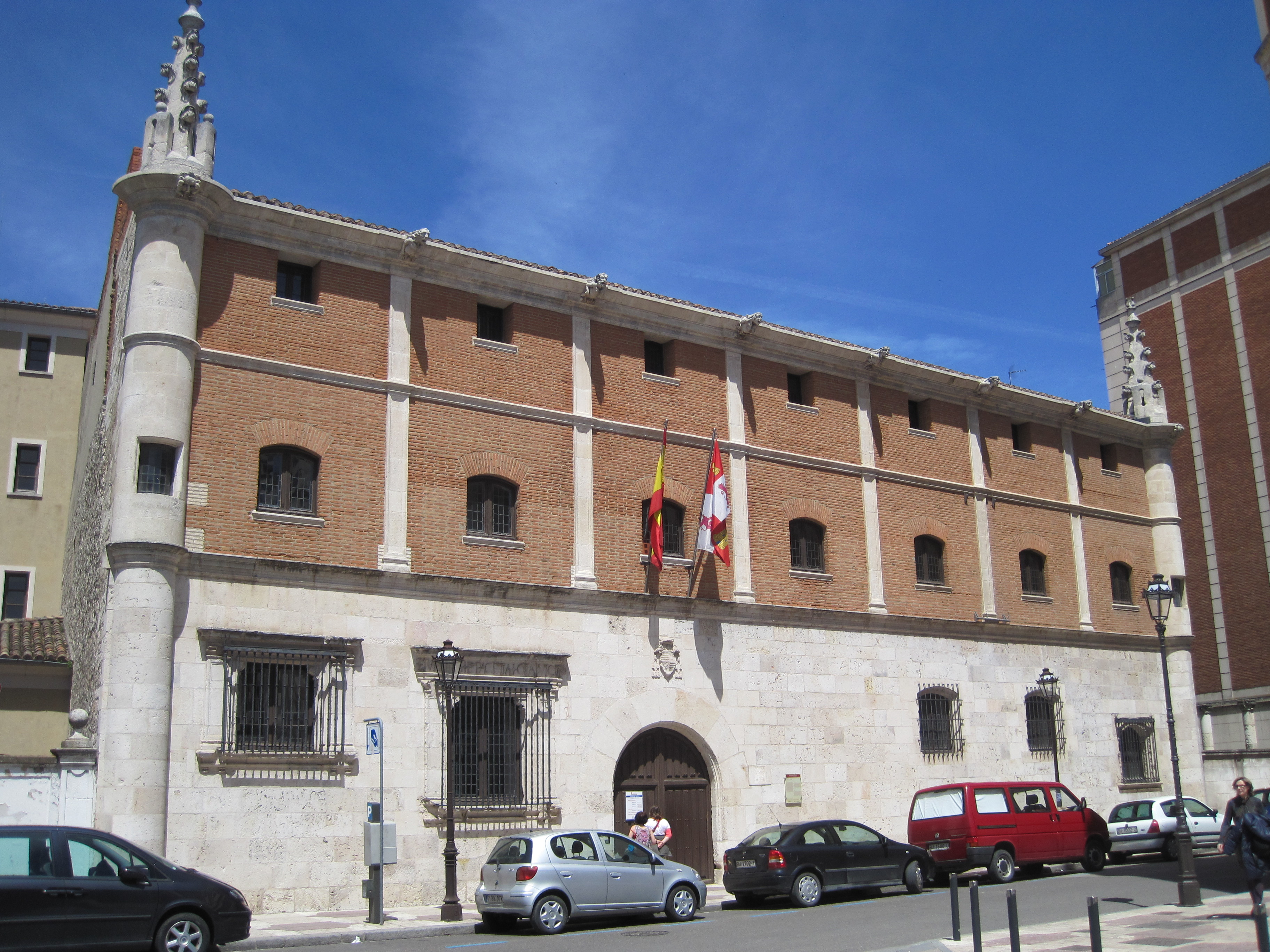 Vista del Museo de Burgos desde la parte sur de la ciudad.